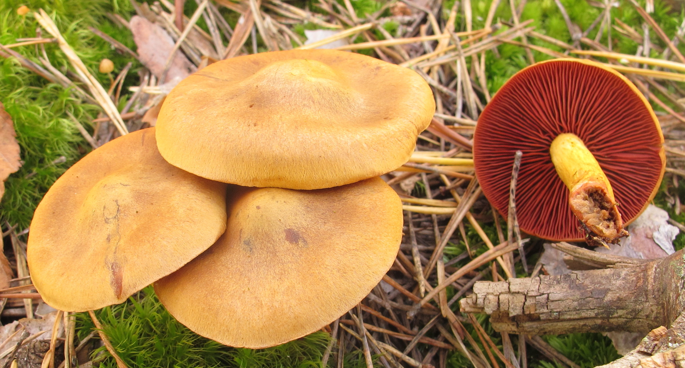 Cortinarius semisanguineus (Fr.) Gill.